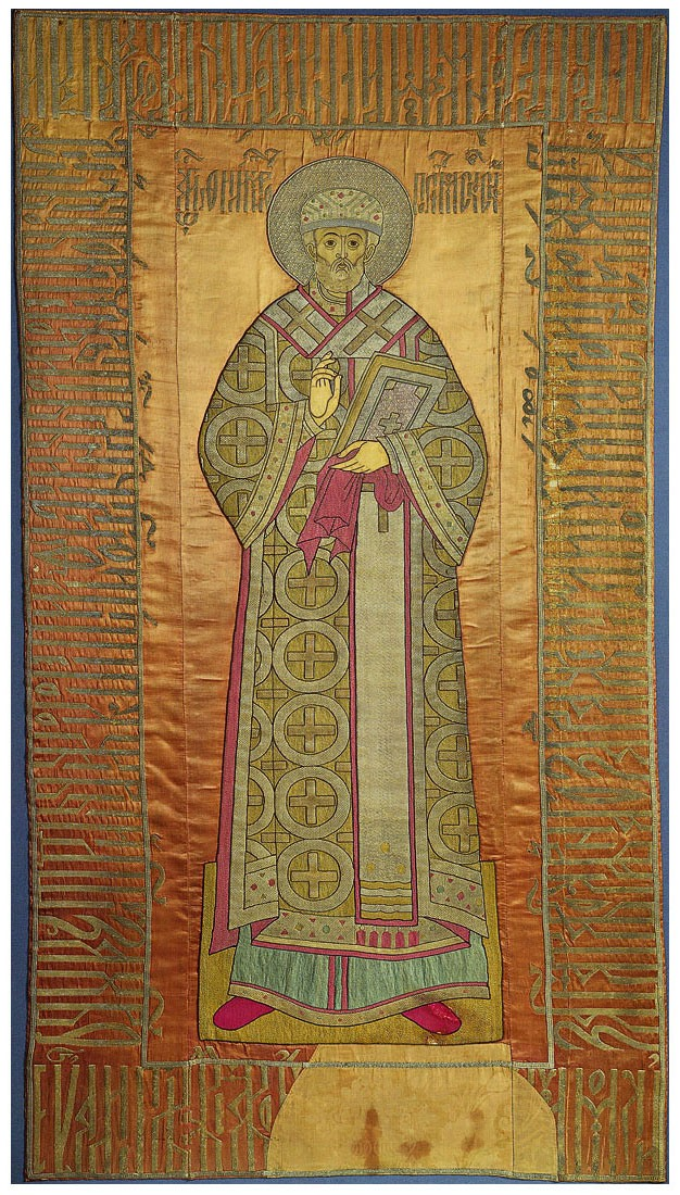 Покров 1592 (?). Москва, мастерская Ирины Федоровны Годуновой (?) Атлас, шелк; шитье золотными, серебряными и шелковыми нитями. 196,5 х 107 Происходит из Соловецкого монастыря Пост. в 1923 из Соловецкого монастыря через ГМФ Рест. в 1933 в ГРМ А. Н Суворовой, повторно в 1963 В музейных собраниях Москвы и Петербурга сохранилось пять лицевых покровов с изображением митрополита Филиппа. Самым ранним из известных сегодня является покров из ГРМ — памятник высочайшего художественного уровня и музейного достоинства. Образ митрополита Филиппа на нем соответствует рекомендациям иконописного подлинника. В среднике изображен святитель в полном архиерейском облачении, по кайме вязью с выносными буквами тонко «прописаны» тропарь и кондак. Лик и руки исполнены «атласным швом» без оттенений «миниатюрными» стежками. Особенная «нежность и мягкость» образного решения, свобода в рисунке и мастерское исполнение произведения позволили Л. Д. Лихачевой отнести его к работам светлиц царицы Ирины Федоровны Годуновой и датировать 1590-ми годами. Н. А. Маясова, отмечая бесспорные профессиональные достоинства памятника, датирует его 1650-ми годами, временем царя Алексея Михайловича.